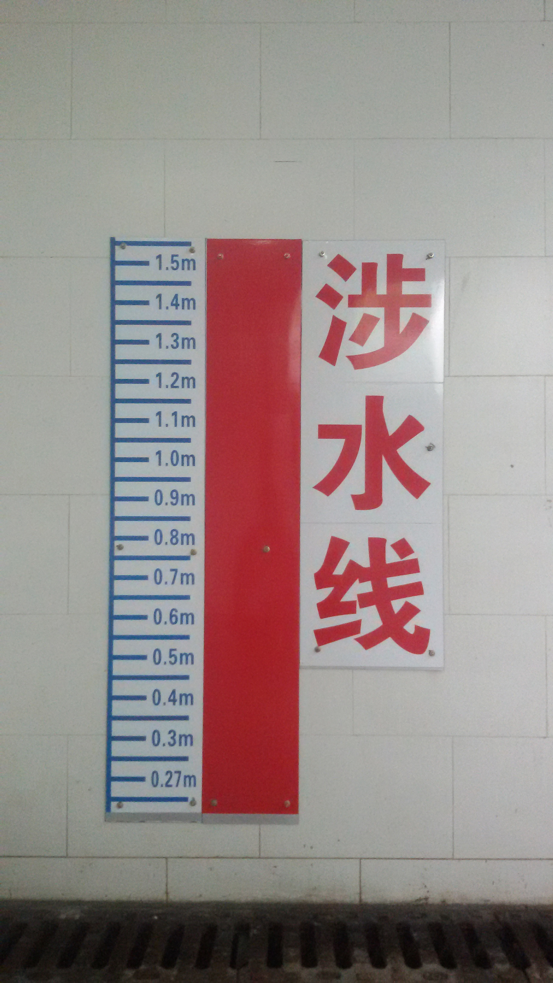 粵語: 涉水線